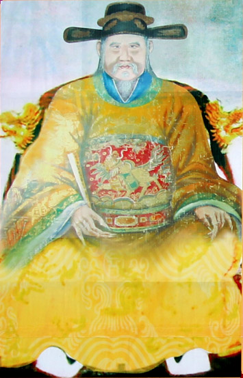 Chân dung Phùng Khắc Khoan (1528-1613). Đây là một viên quan nhà Hậu Lê, và là một danh sĩ Việt Nam.